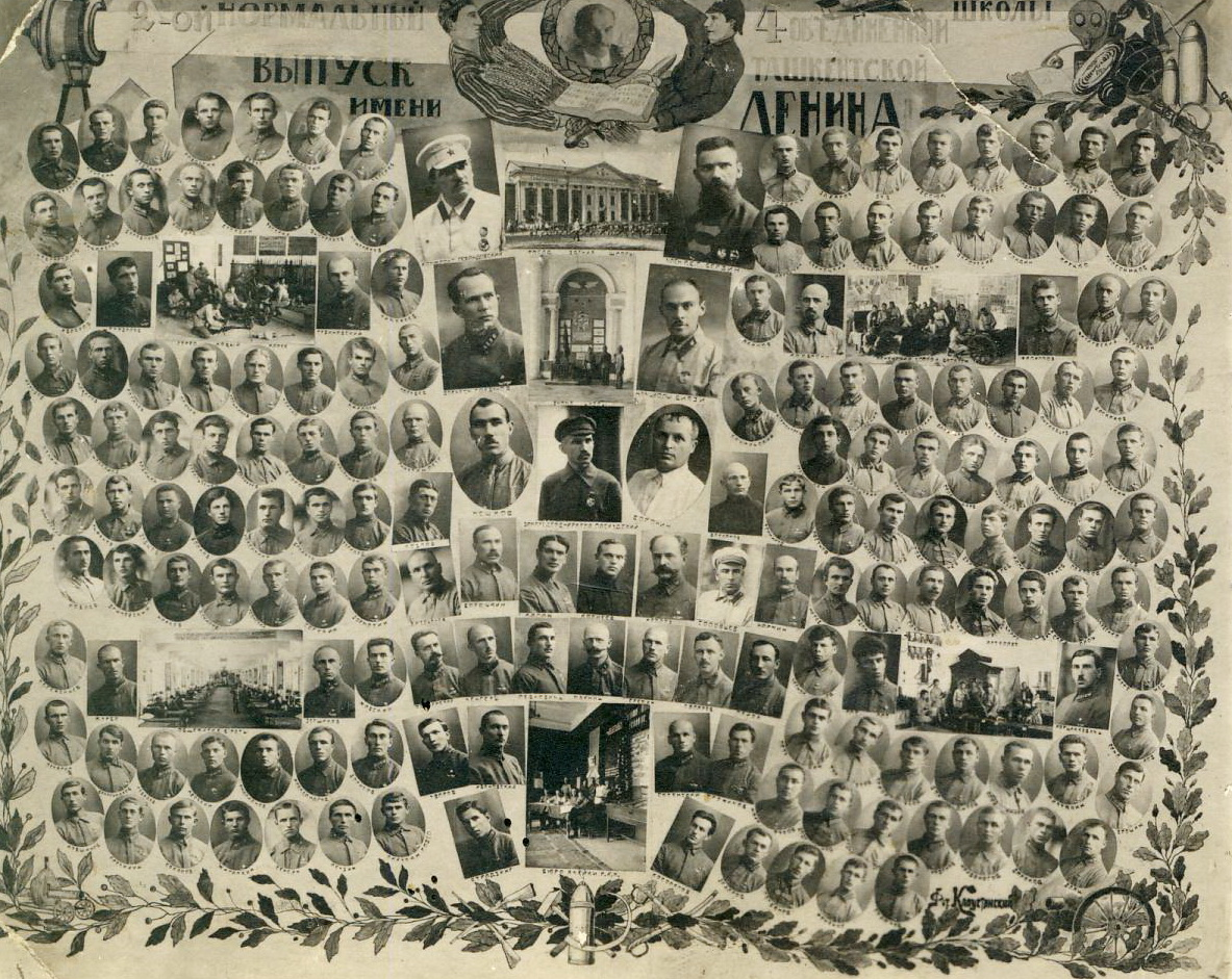 Второй выпуск 4-ой Ташкентской Объединенной имени В.И. Ленина командной школы (ныне Ташкентское высшее общевойсковое командное училище имени В. И. Ленина)